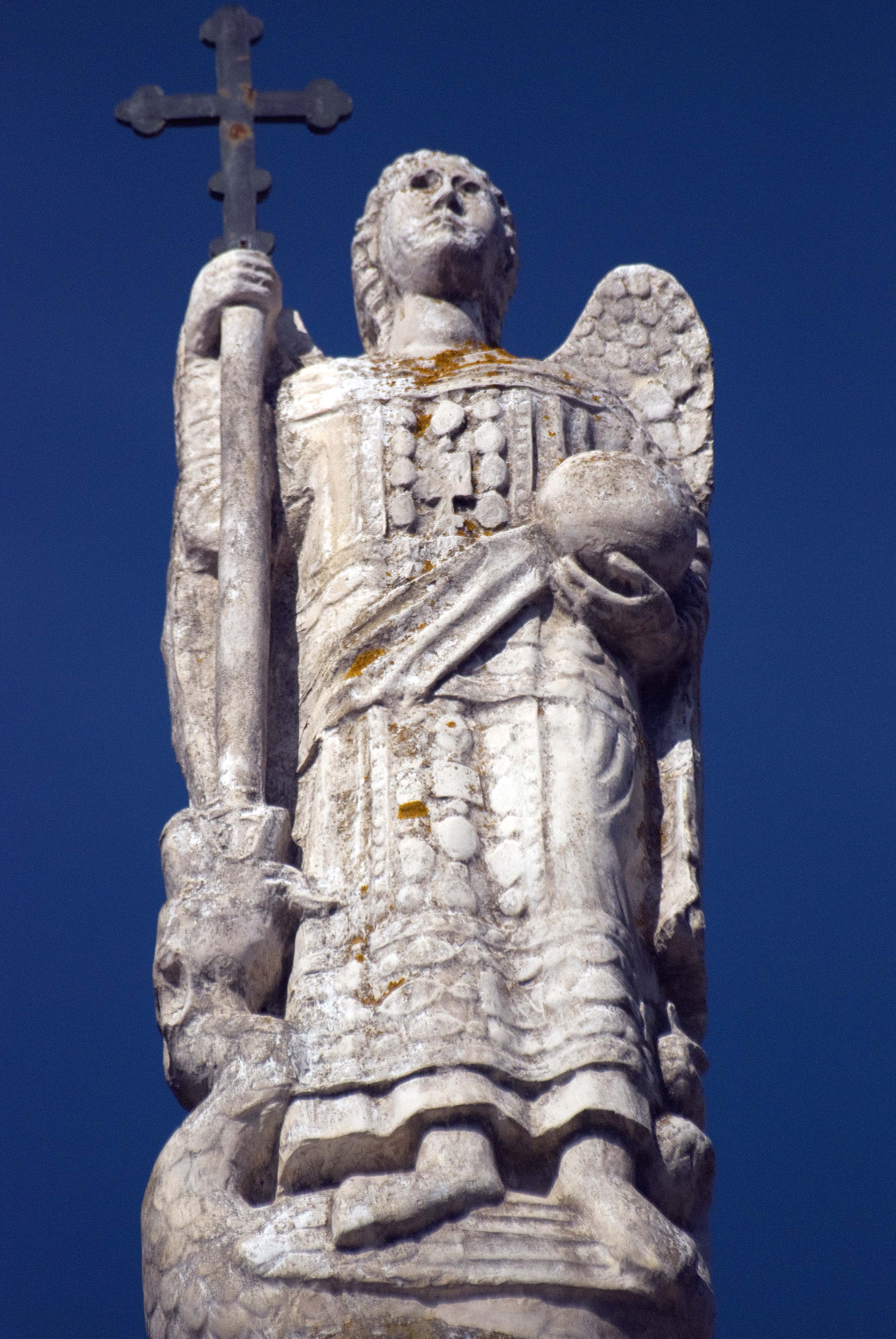 statua di san michele arcangelo (XII secolo) Badia a Passignano